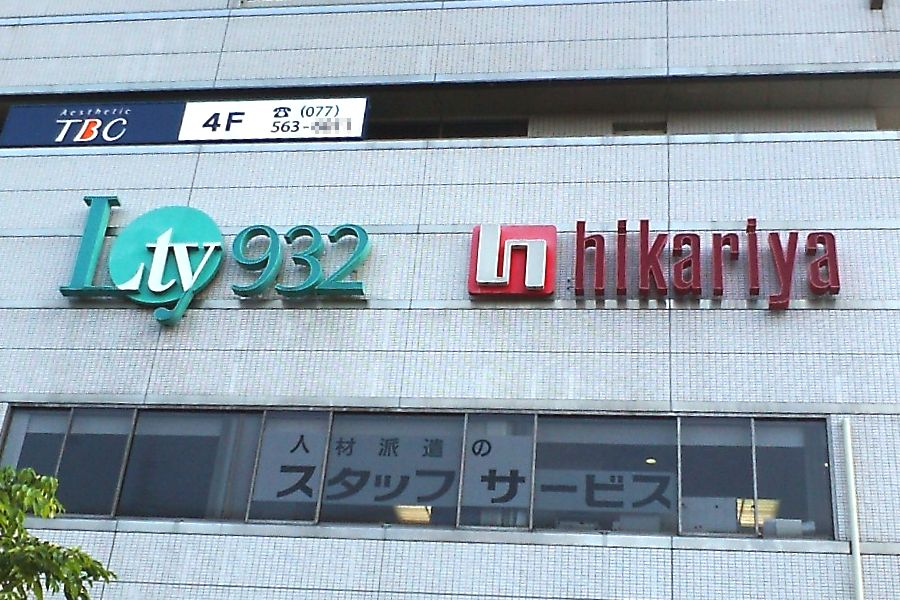 Lty932 & Hikariya (old logo), Kusatsu, Shiga, Japan.